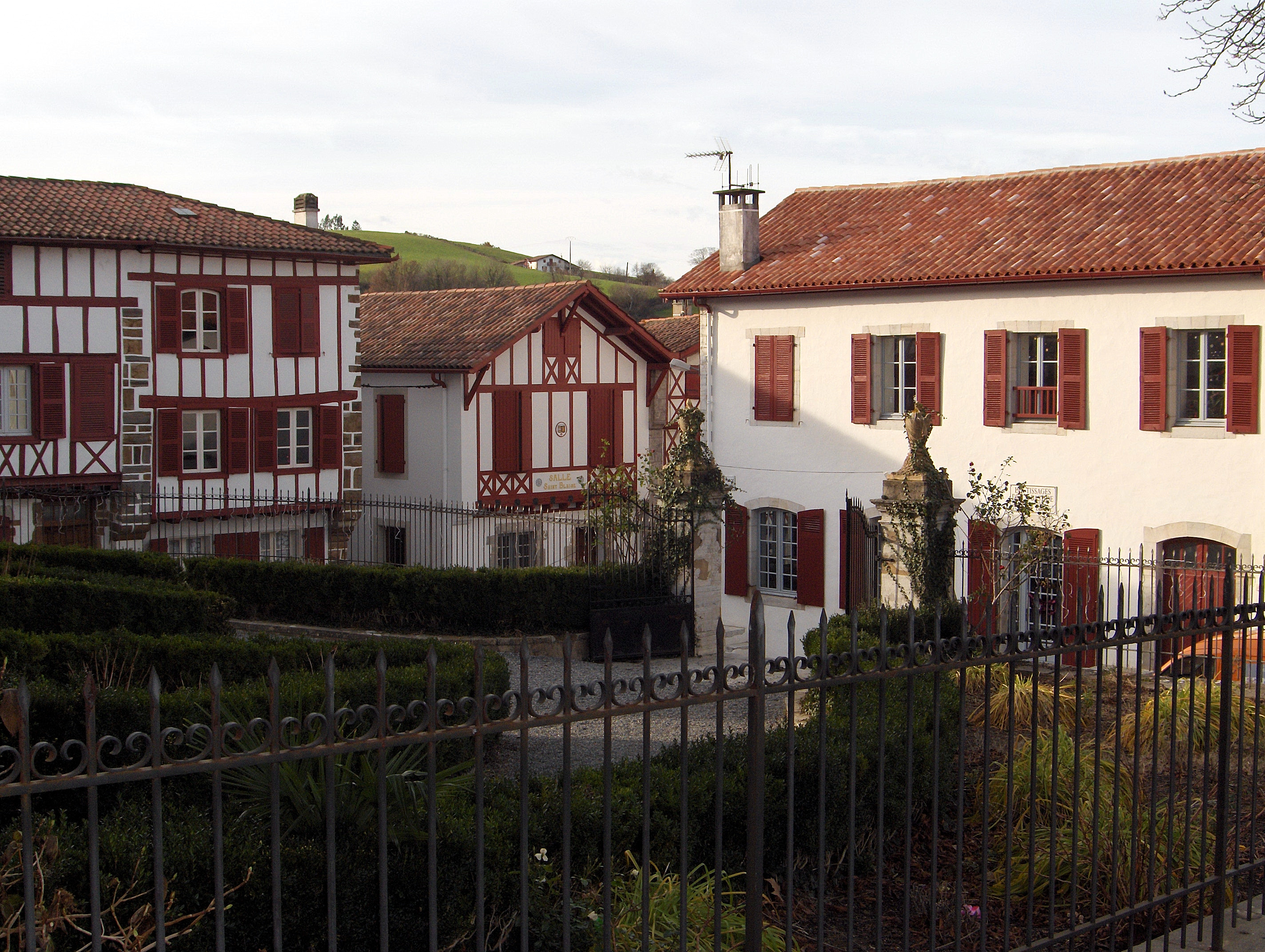 Photo de La Bastide-Clairence, Pyrénées-Atlantiques, France. Photo prise par Jibi44 en janvier 2007.